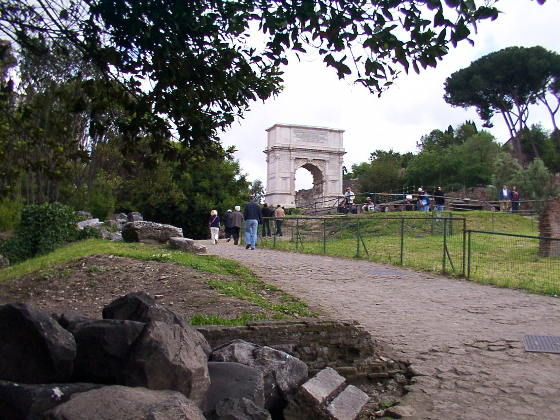 הרחוב עליו צעדו השבויים מפורו רומנו נחשף בימי מוסוליני ראה הפרשי הגובה